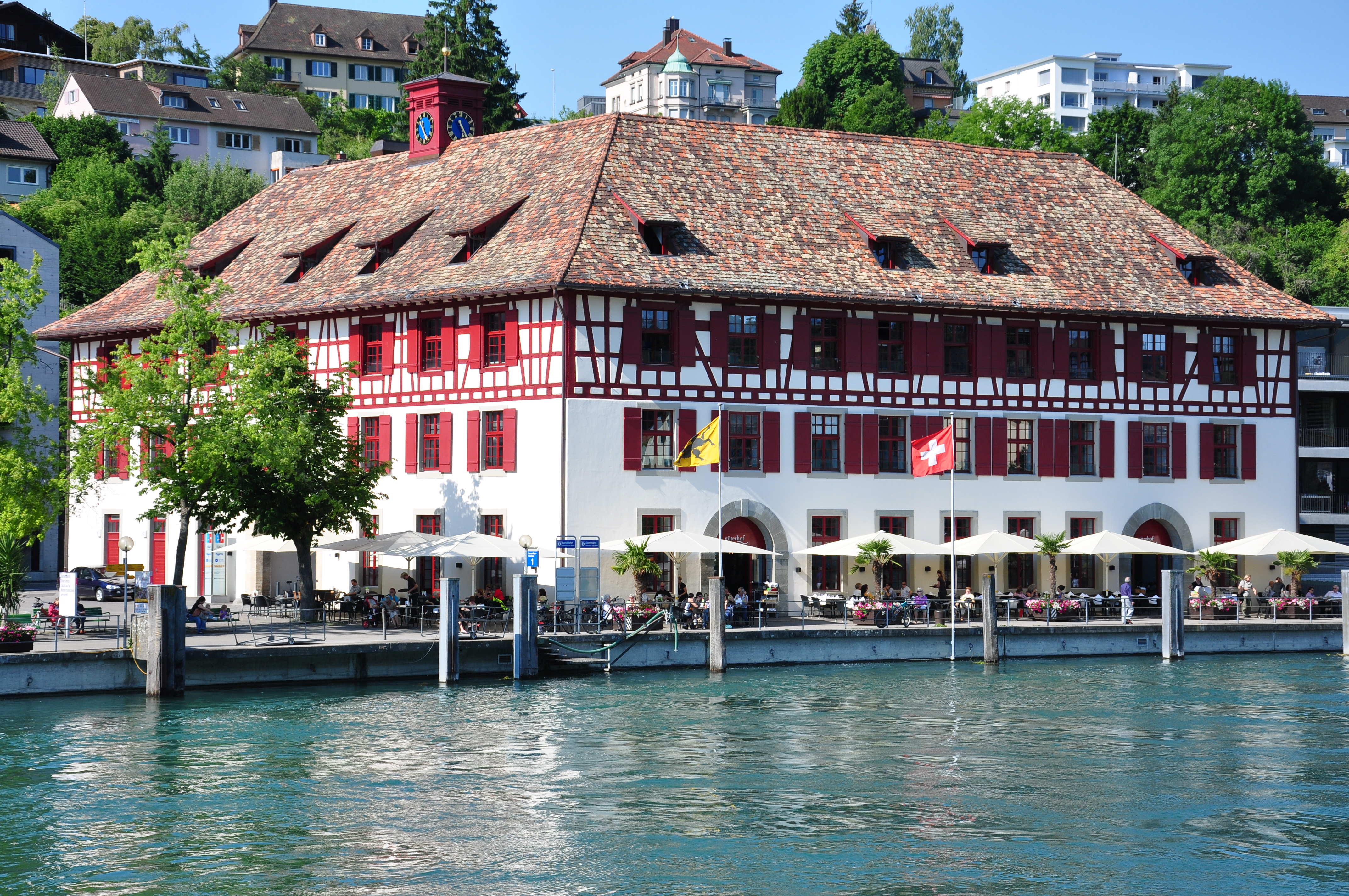 Güterhof in Schaffhausen (Switzerland) as seen from Feuerthalen